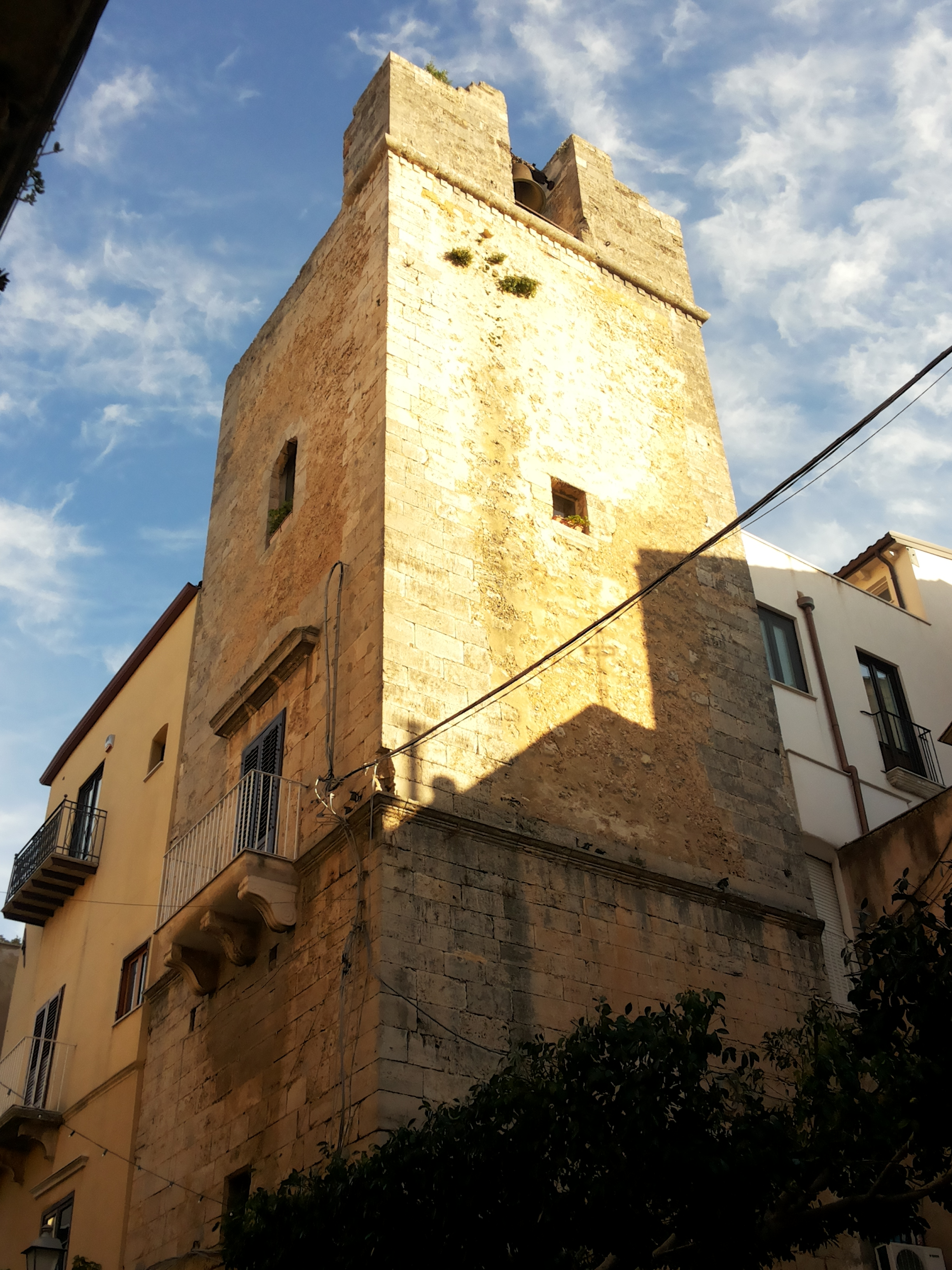 Torre di avvistamento nel centro storico di Alcamo